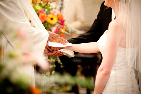 Bénédiction des époux pendant le cérémonie du mariage.